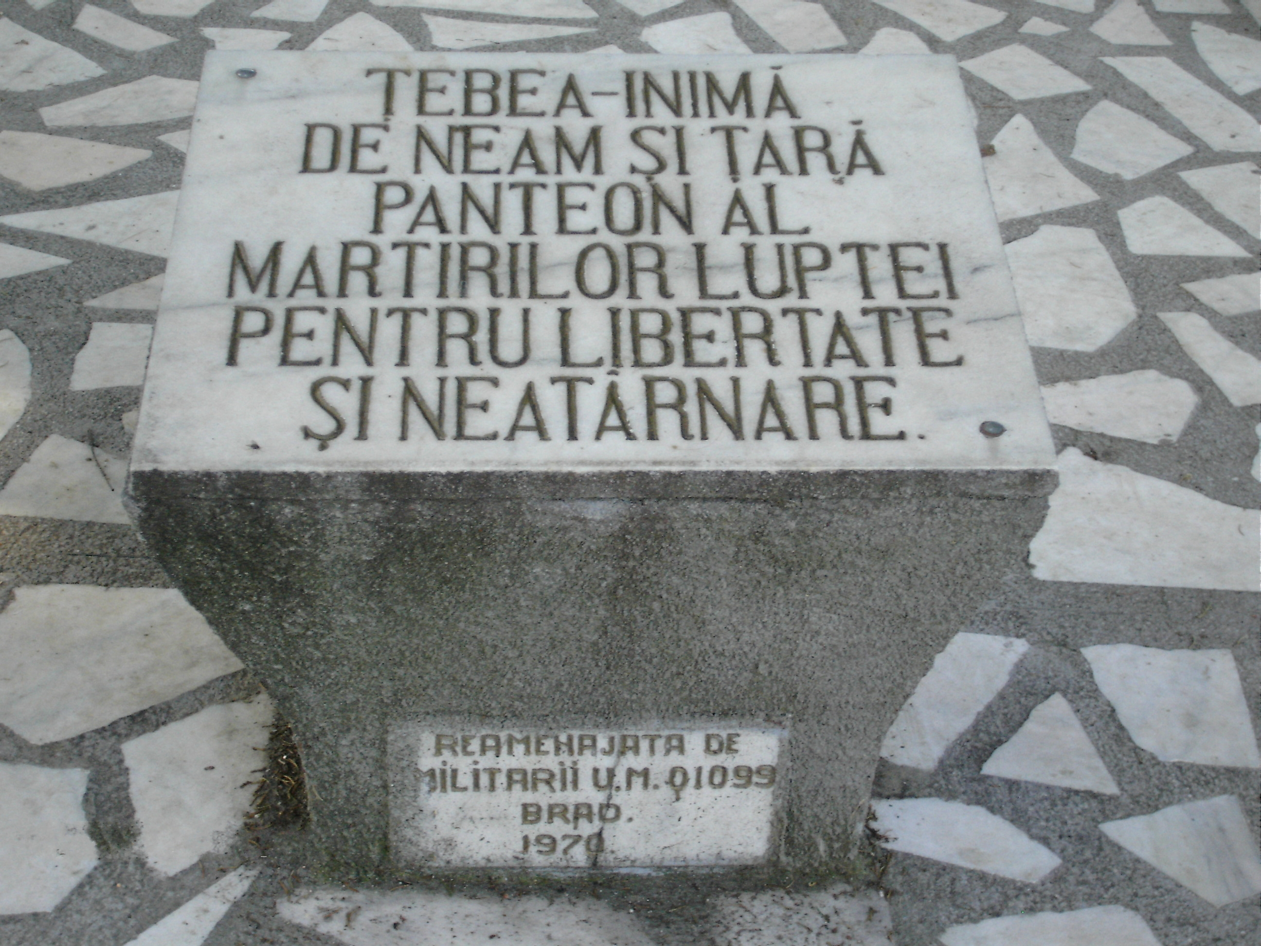 Cimitirul eroilor